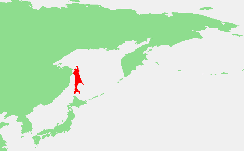 Sakhalin